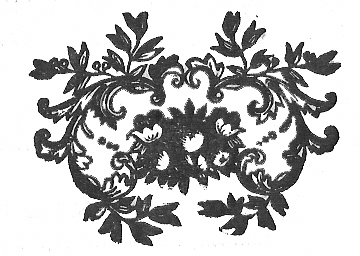 Scan einer Kranz-Zeichnung aus der dritten Auflage des höflichen Schülers. Mit Adobe Photoshop 7.0 bearbeitet